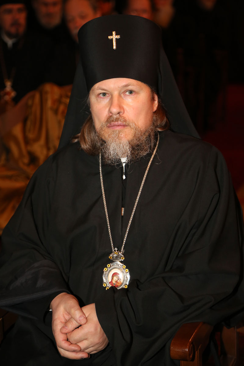 Erzbischof Mark (Golowkow)